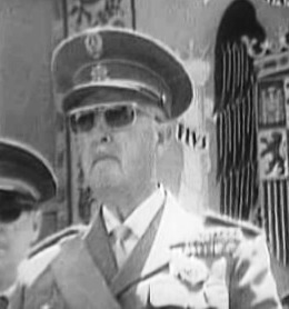 Imagen del general Franco en un desfile, probablemente de 1969.